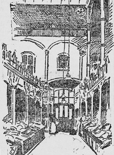 Illustration av Sveahallens interiör